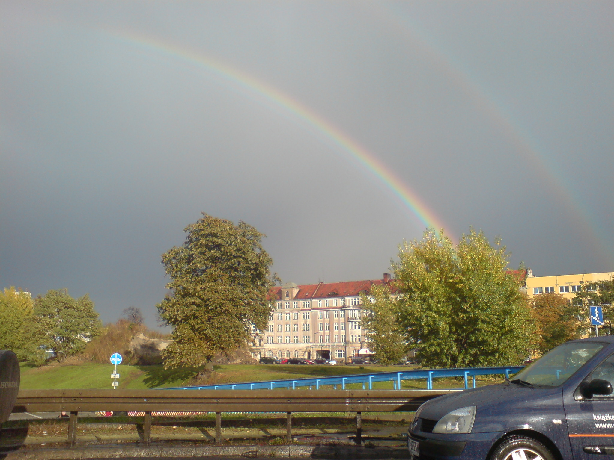 W tle ul. Mazowiecka i Impart - nucek